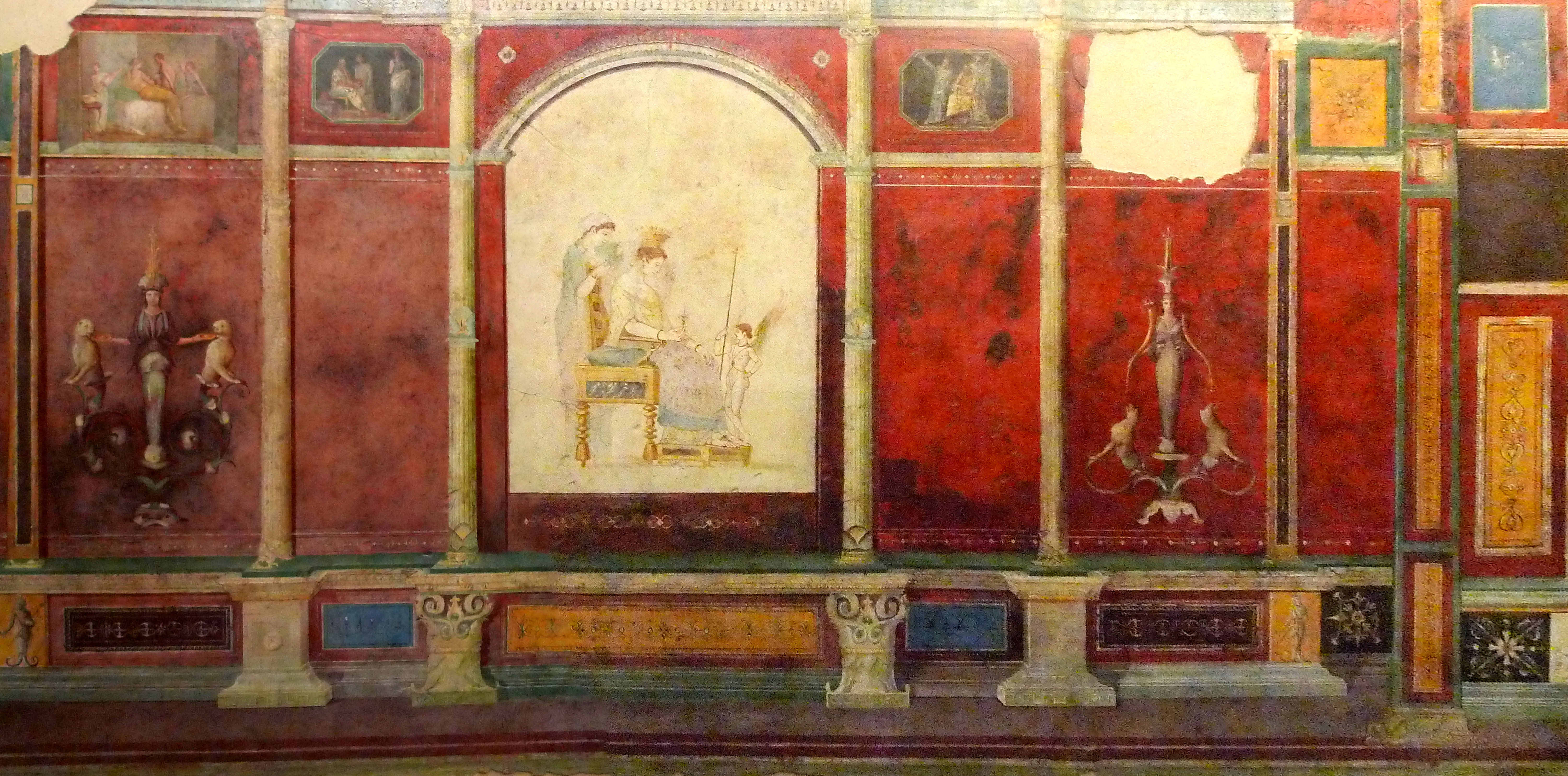 Affresco Romano della Farnesina Museo Nazionale - Palazzo Massimo